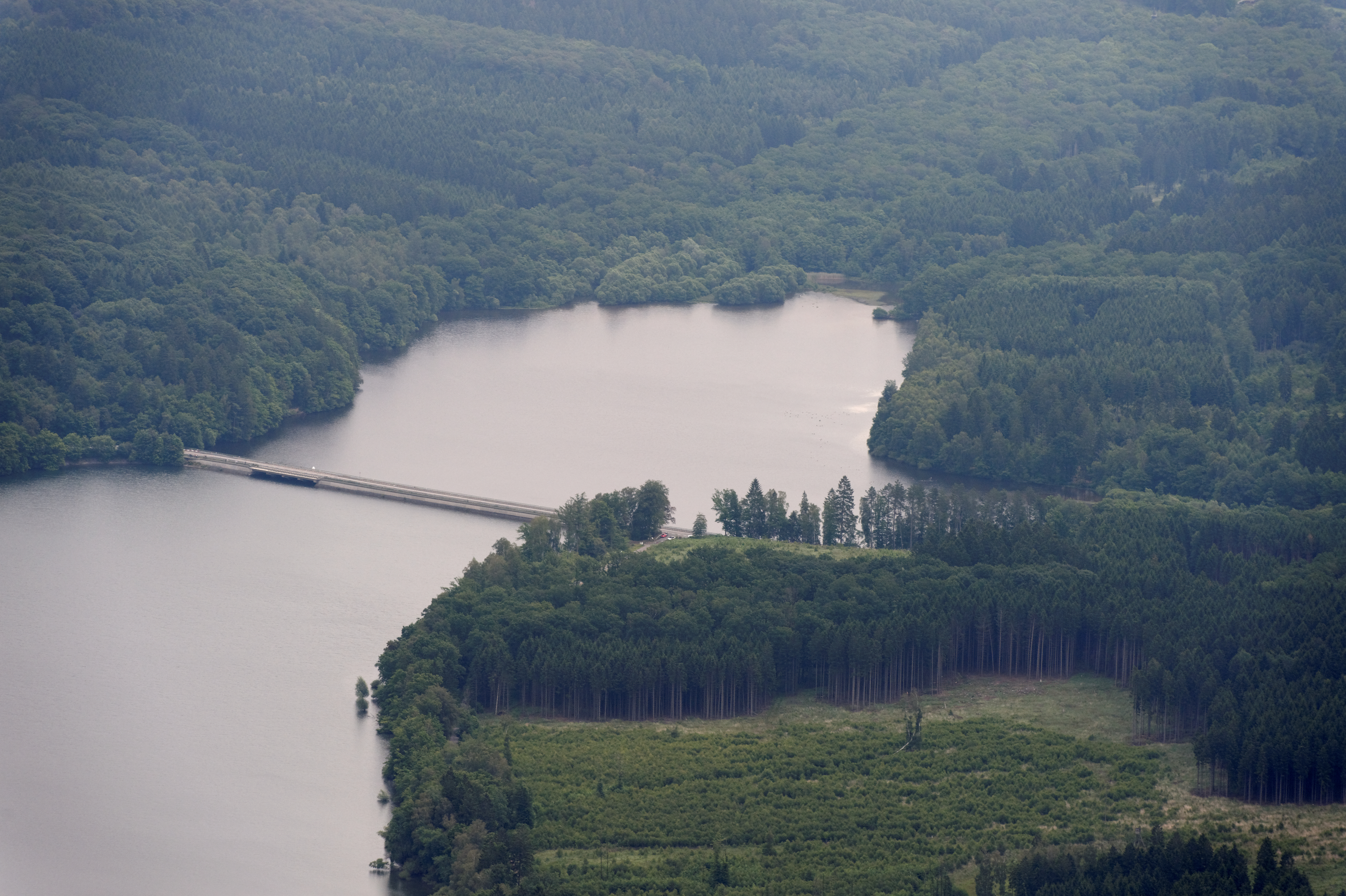 Möhnesee: Hevedamm mit Möhnesee vorne und Hevesee hinten. Naturschutzgebiet Hevearm und Hevesee (SO-005) (Fotoflug Sauerland Nord)